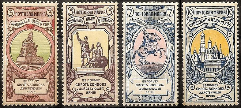 Russia semi-postal stamps, 1904.